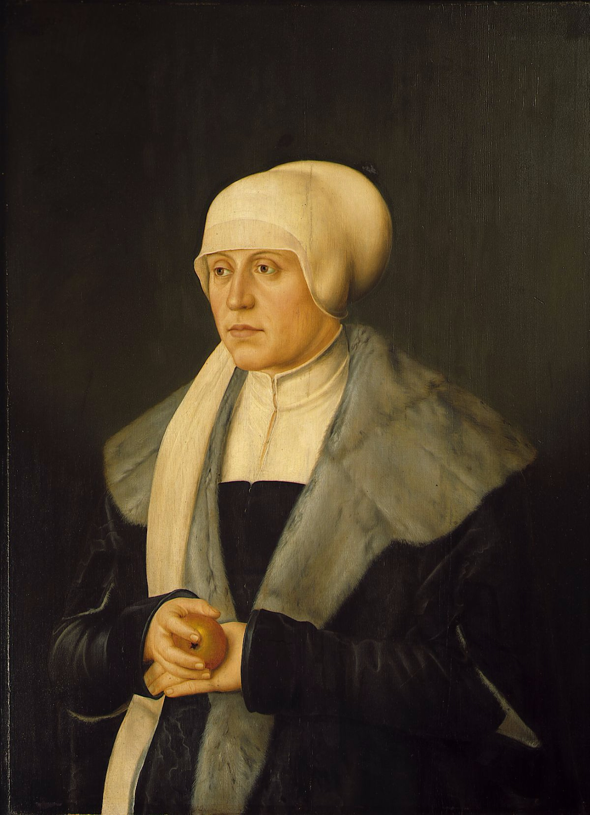 Kunigunde von Österreich (1465-1520), Gattin Herzog Albrechts IV. von Bayern